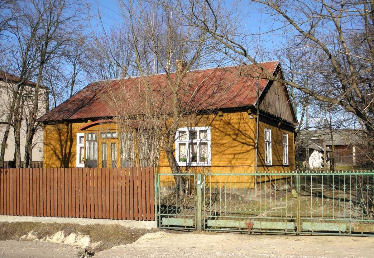 Jastrzębia 58